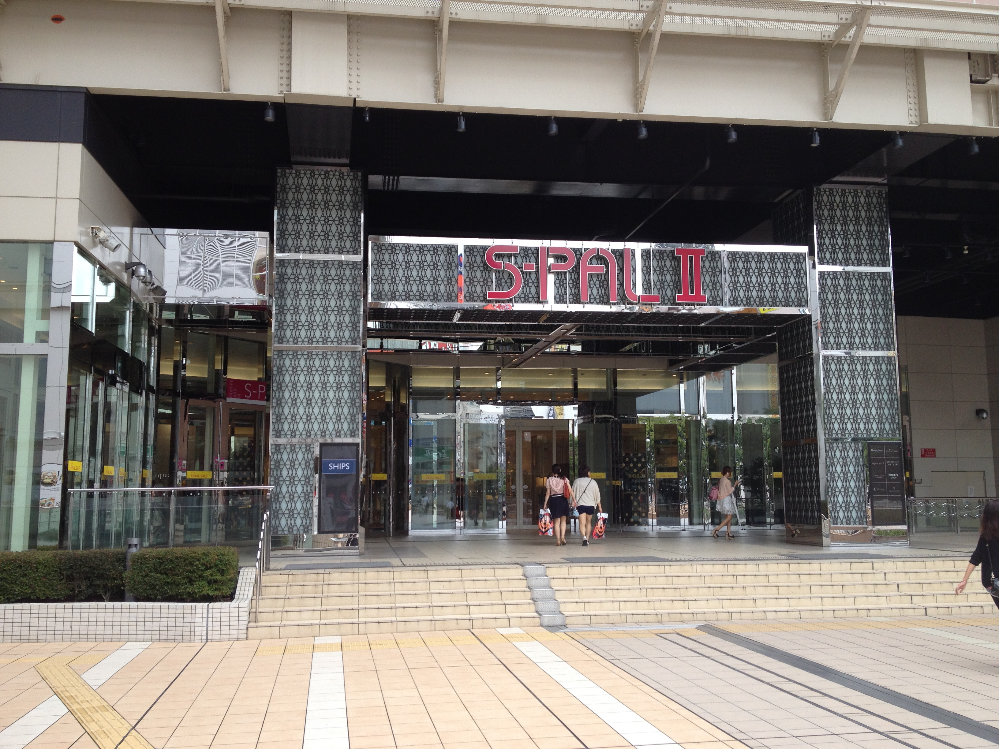 仙台駅西口 S-PAL II（エスパルII）エントランス